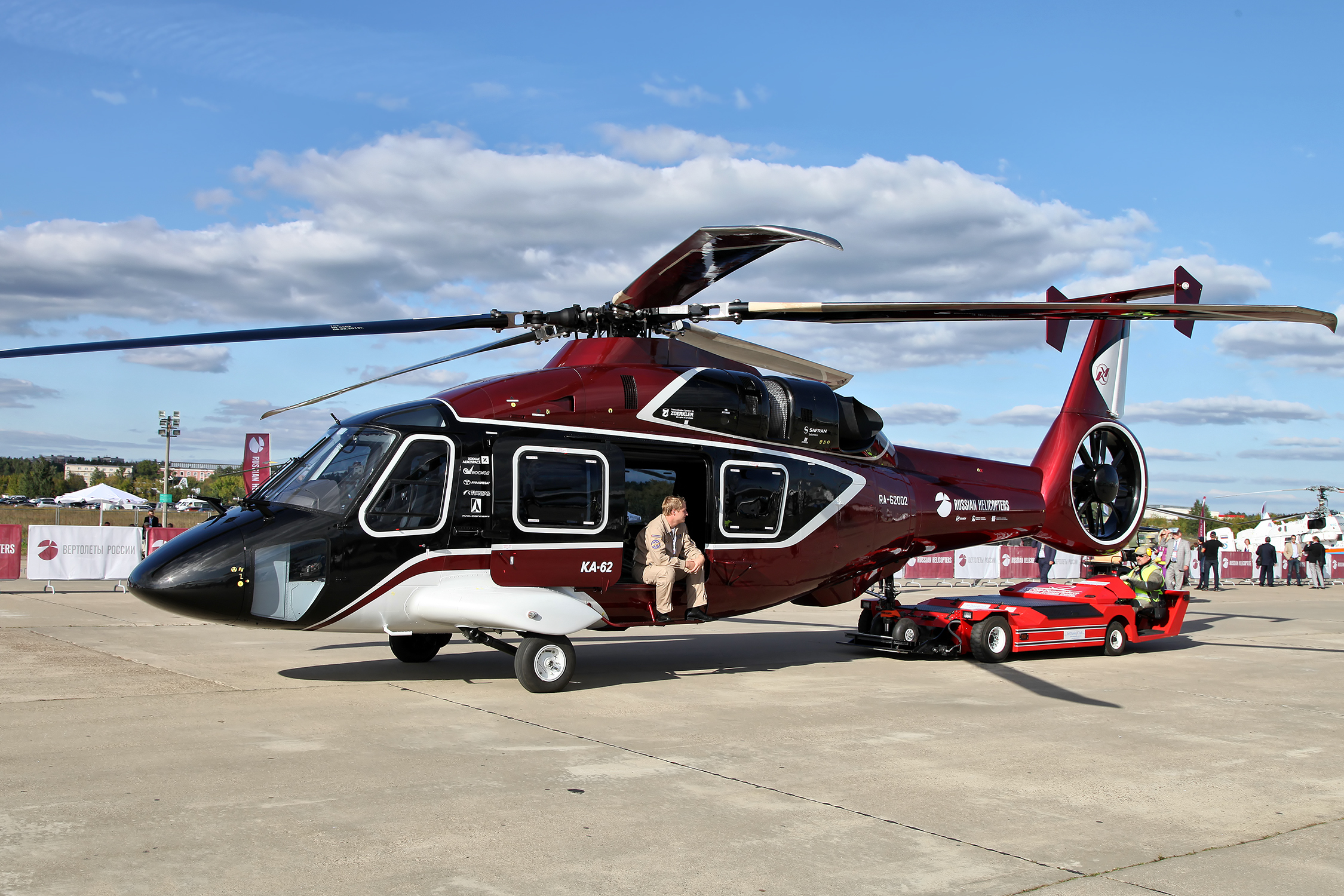 Ka-62